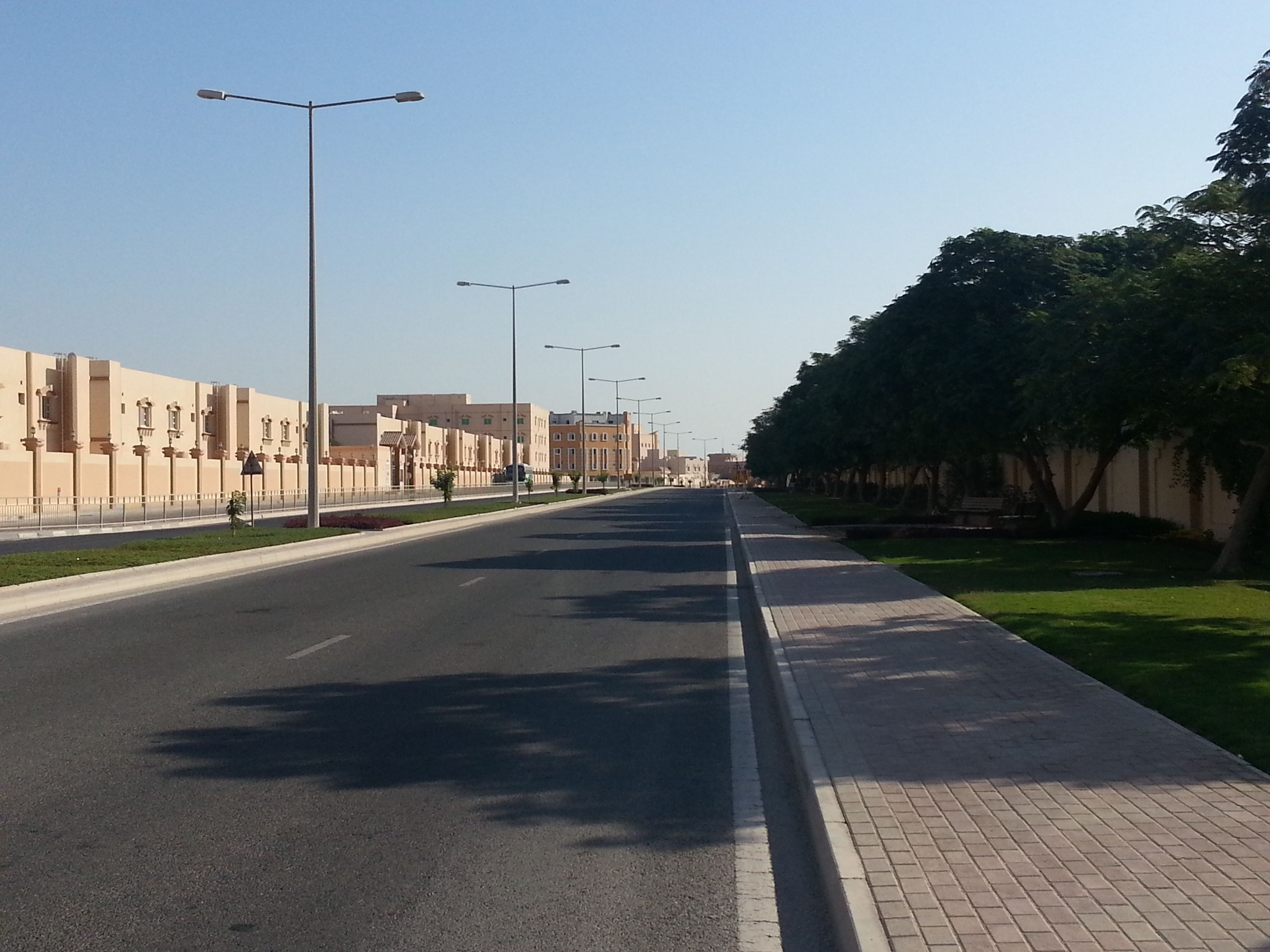 al khor- ras laffan road. qatar